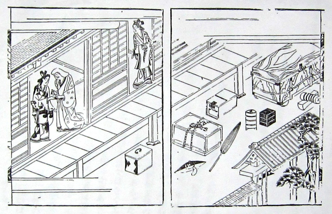 西鶴「好色五人女」挿絵「お七と吉三郎出会い」の場面